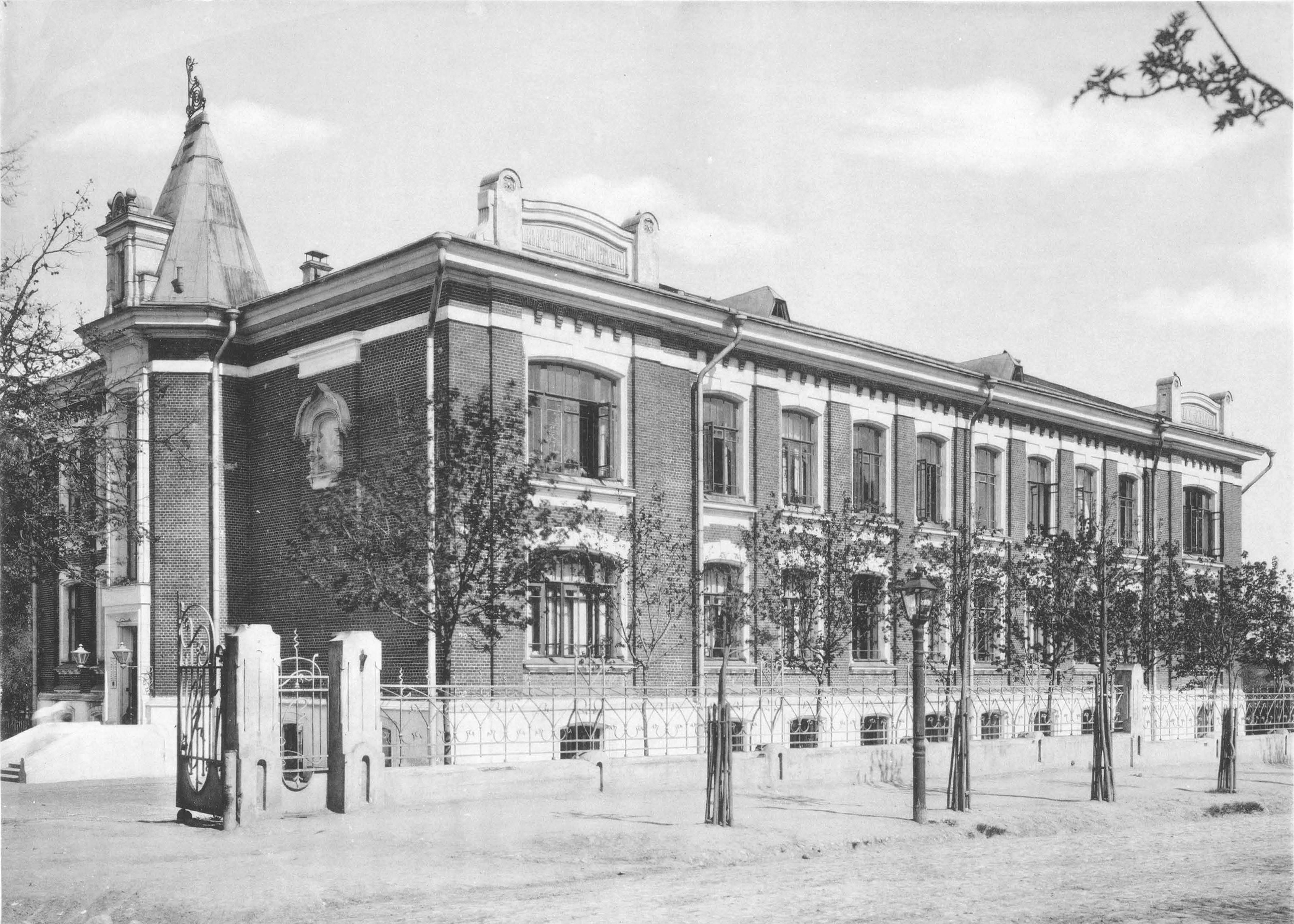 89. Домъ призрЪнiя неизлЪчимо-больныхъ имени И. Д. Баева старшаго на Ермаковской улицЪ. (Москва)